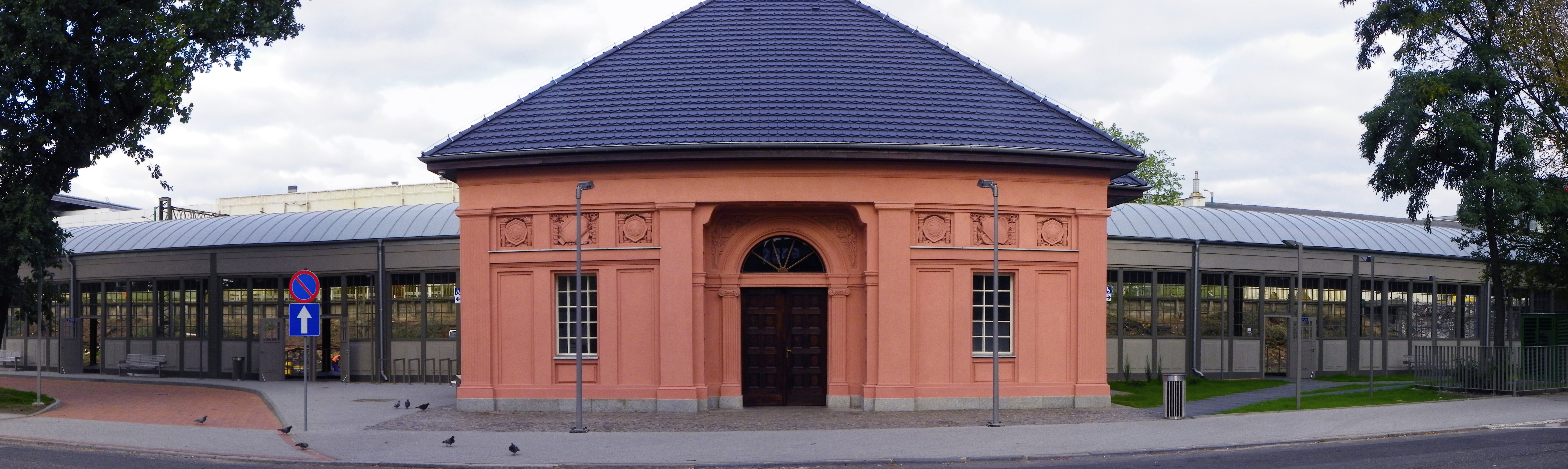 Dworzec Letni w Poznaniu. Widok frontowy.